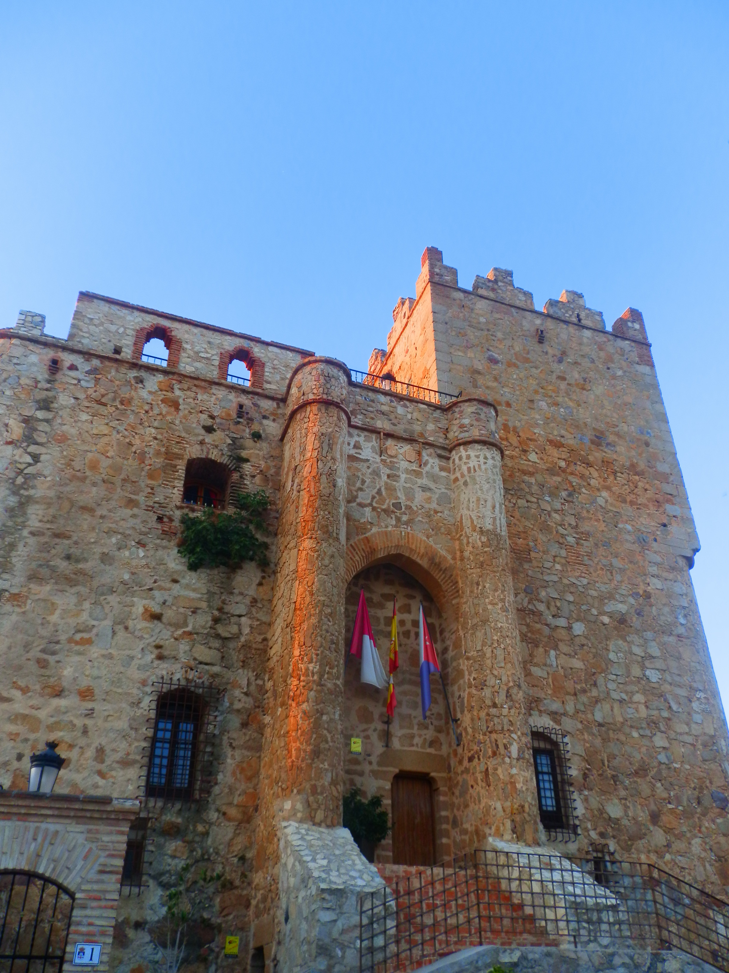 Se podrá encontrar en el corazón del pequeño pueblo de Manzaneque en la provincia de Toledo.